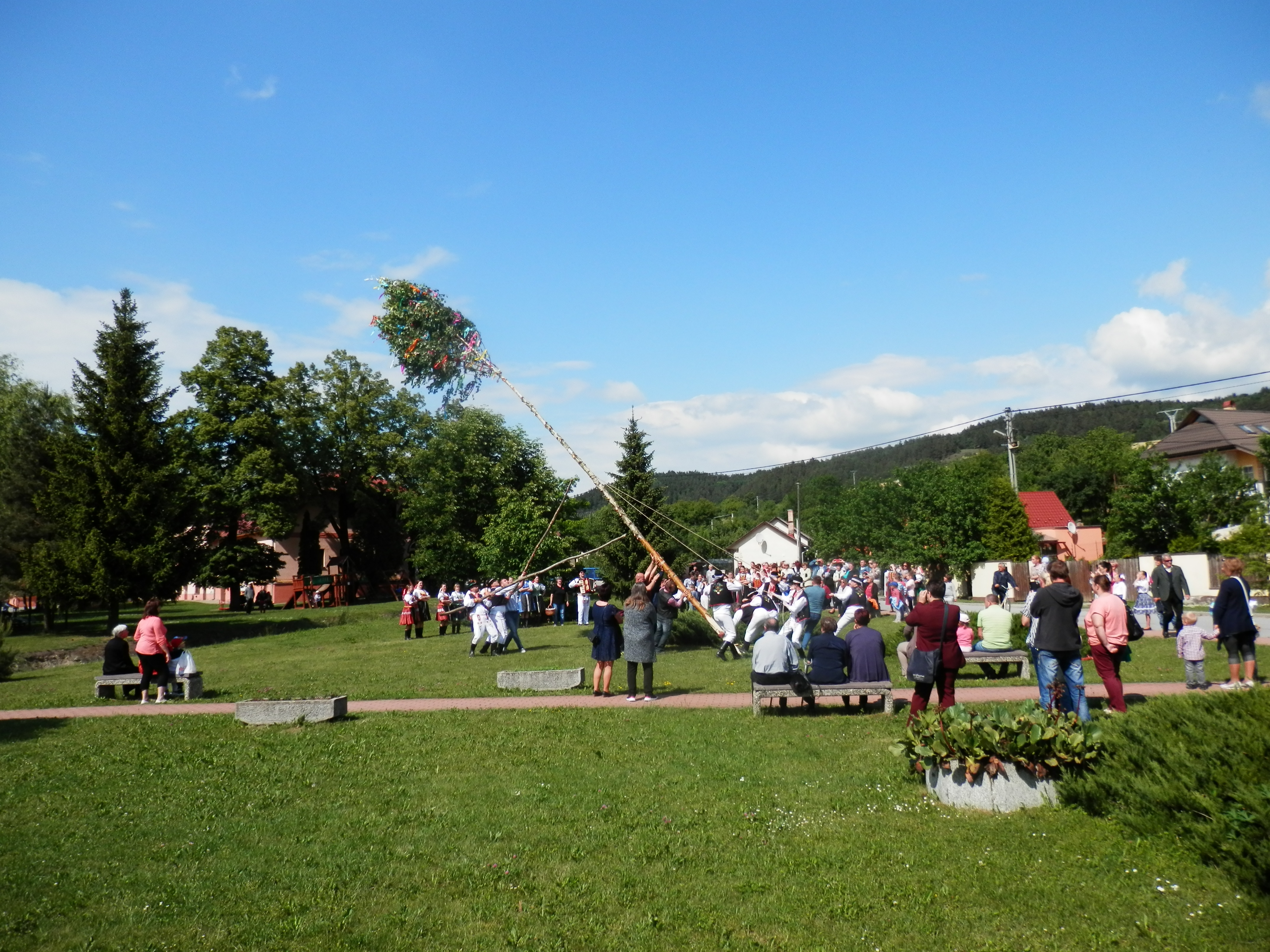 Stavanie mája 20.5.2018 členmi folklórneho súboru Sedličan. Obec Sedlice, okres Prešov. Slovensko.